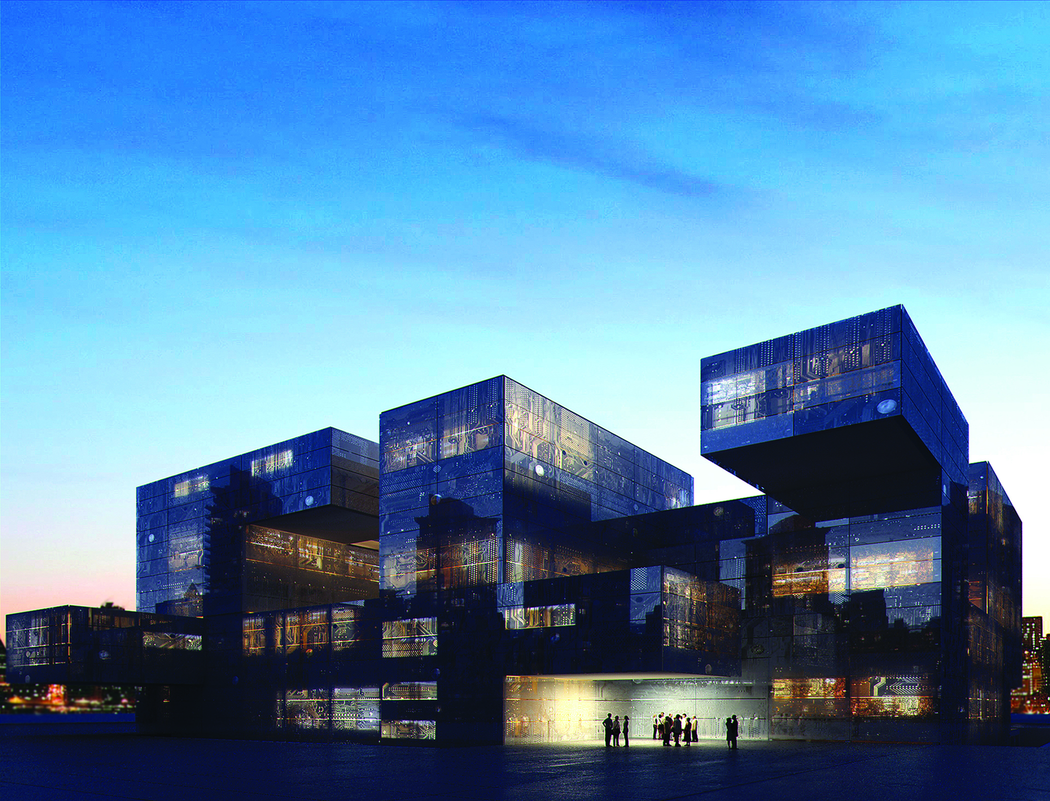 Proyecto CPD